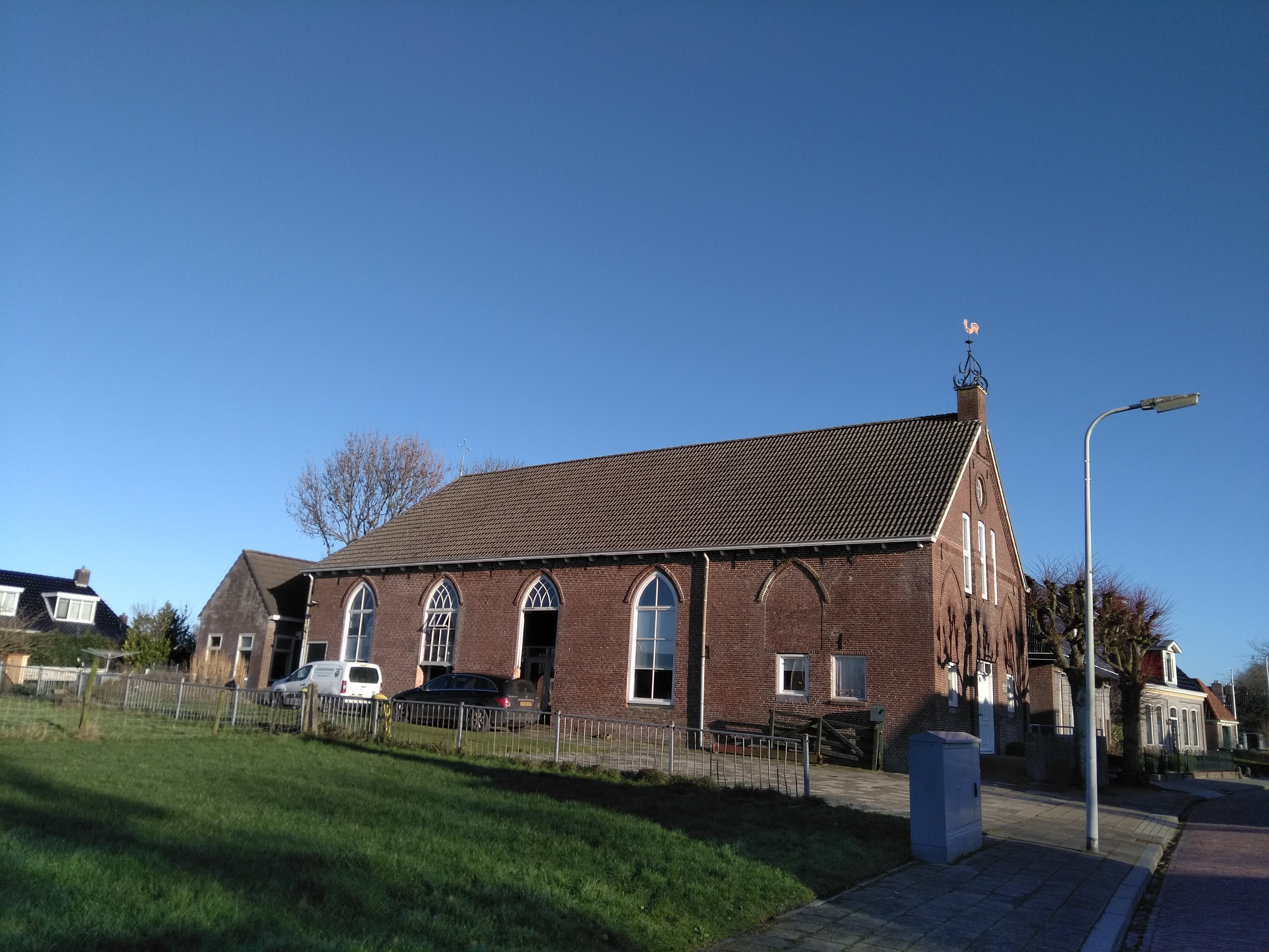 Voormalige gereformeerde kerk "De Moeting" te Niawier uit 1893. Sinds 2010 in gebruik als woonhuis.